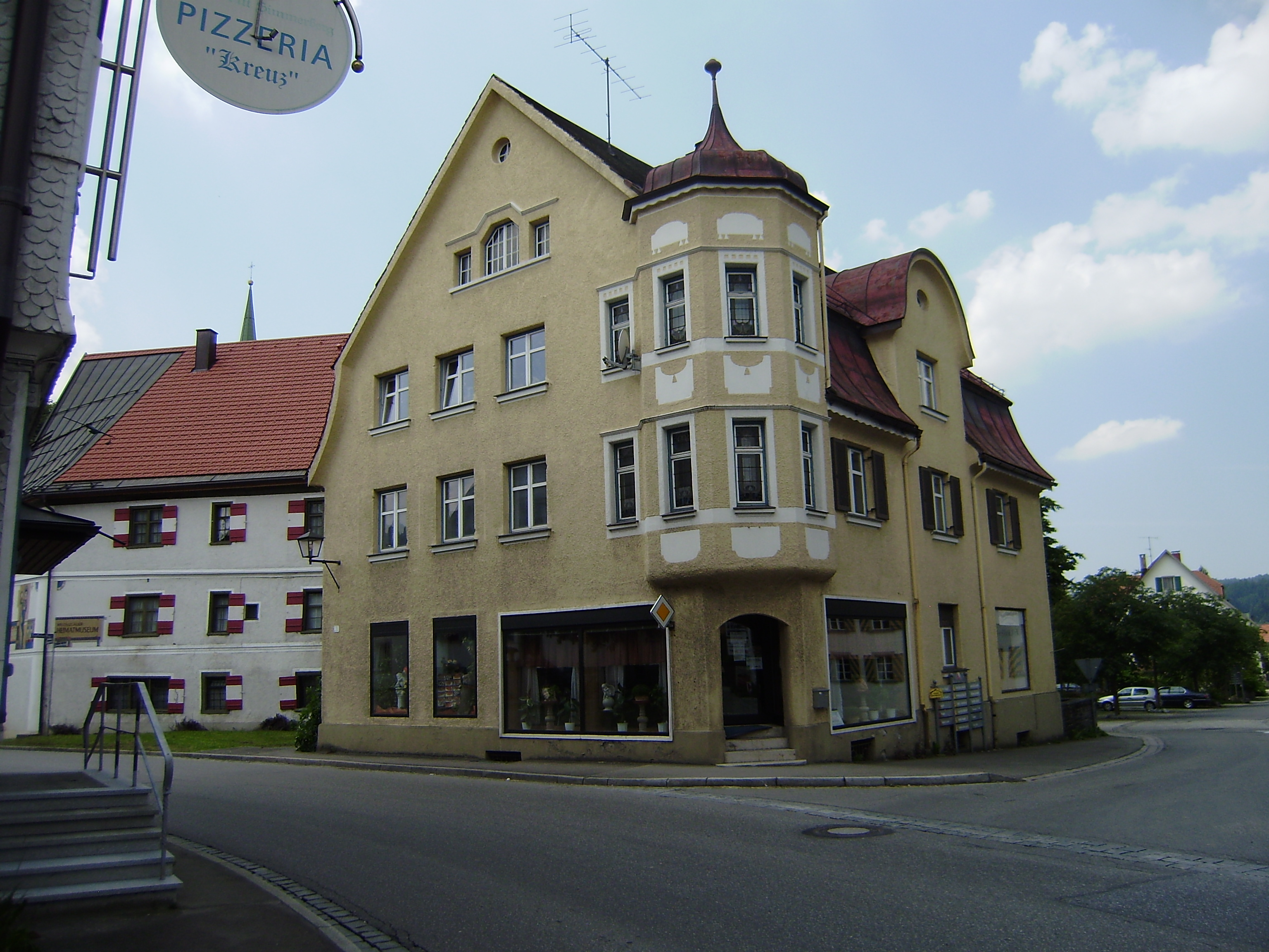 Kaufhaus Eschenlohr, Weiler iA, von Nordosten. Der Baumeister Georg Bufler baute 1910 dieses vielgestaltige, elegante, große aber nicht schwerfällig wirkende Geschäftshaus in Weiler im Allgäu in der Alois-von-Brinz-Straße 1 an der Ecke zur Fridolin-Holzer-Straße